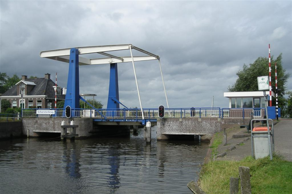 Brug in Scharsterbrug over de Skarster Rien